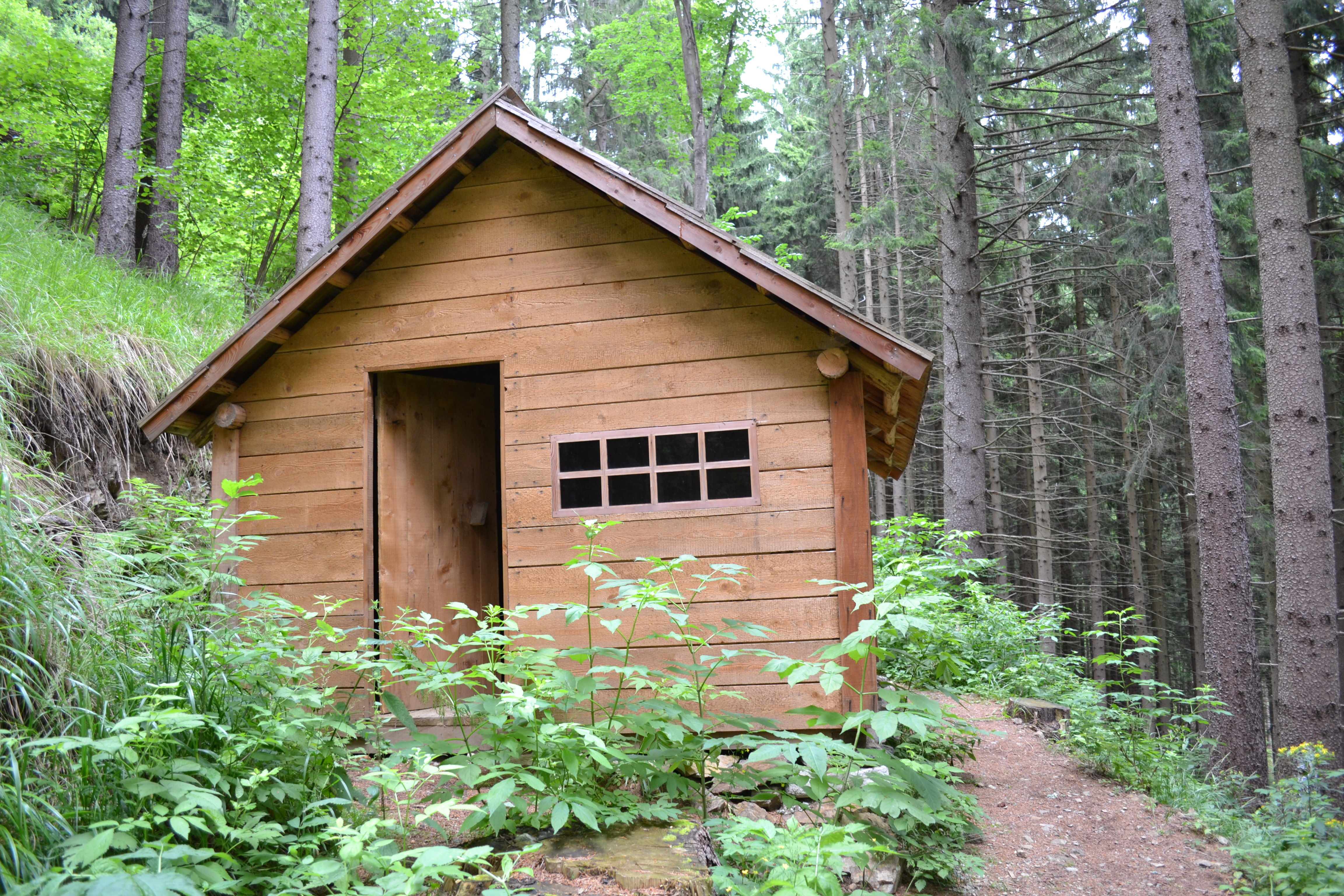 Paučkove partizanske bolnice: največji objekt.